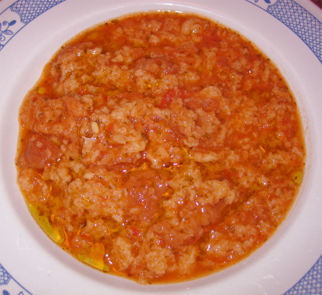 ricetta/recipe sul mio Blog Il Mondo di Luvi